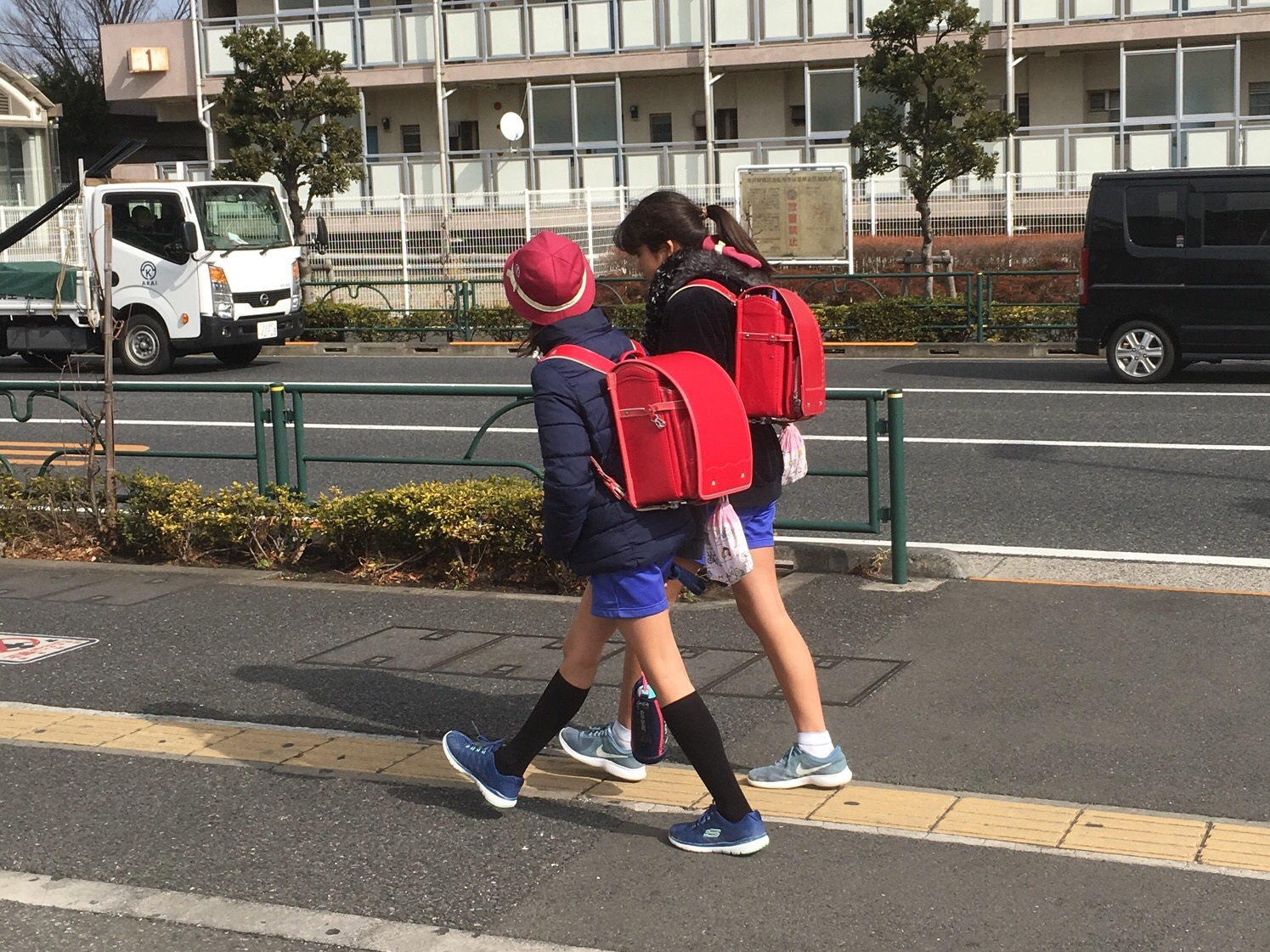 ランドセル (randoseru)